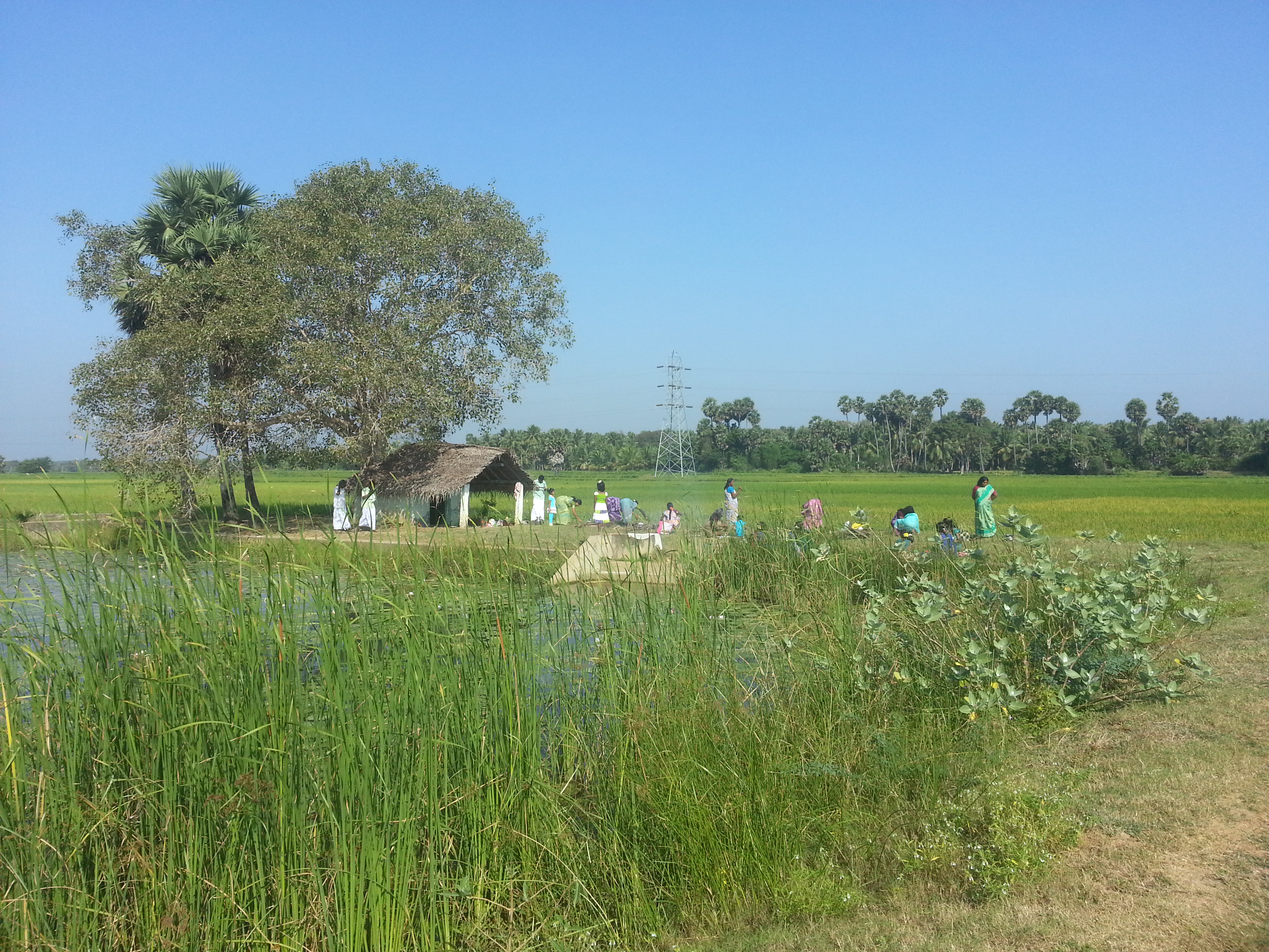 முடச்சிக்காடு அருள்மிகு சிவலிங்க சித்தி விநாயகர் கோயில், முடச்சிக்காடு